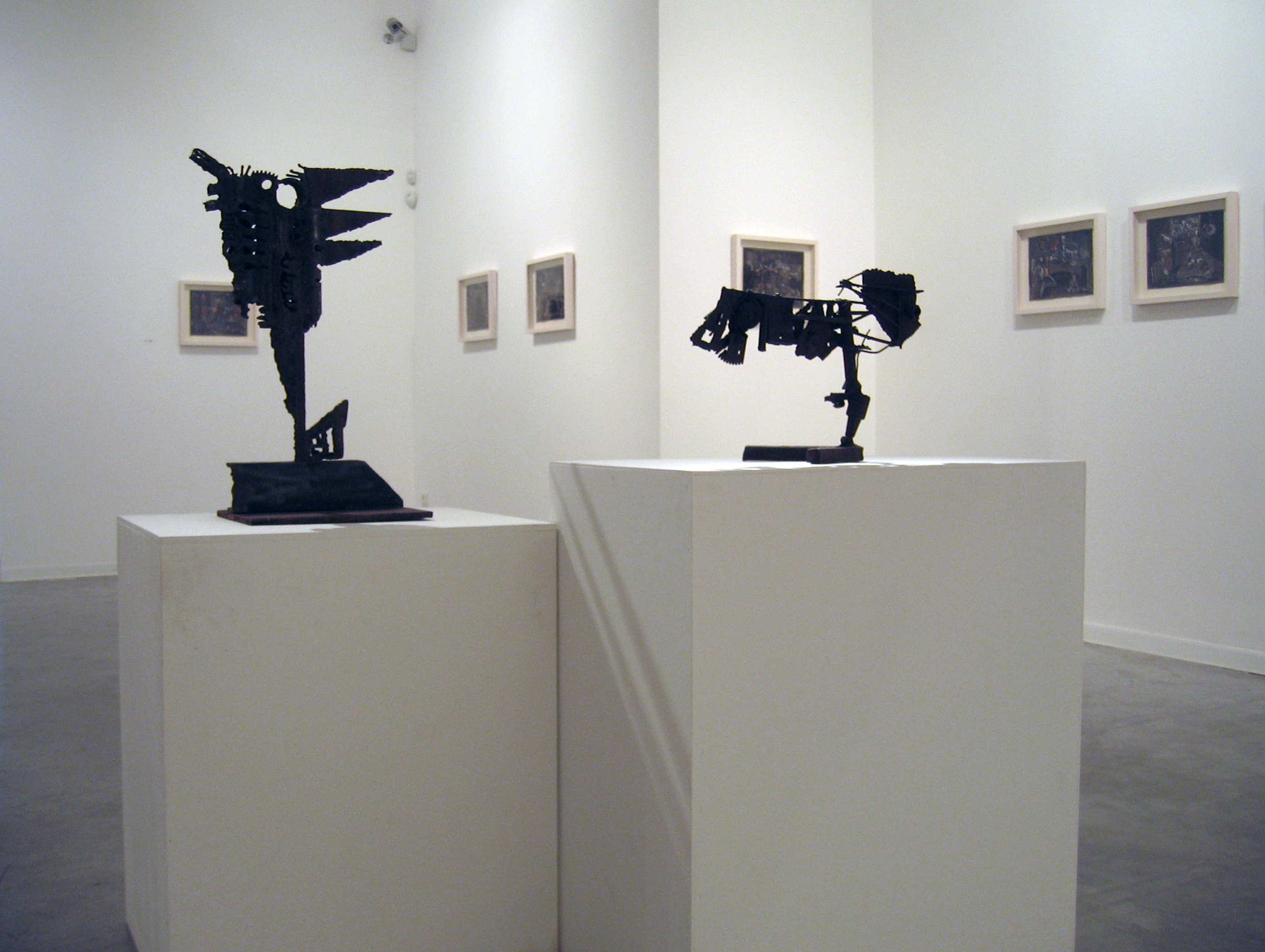 עבודות של יגאל תומרקין בתערוכה בגלריה חזי כהן, רח' וולפסון תא